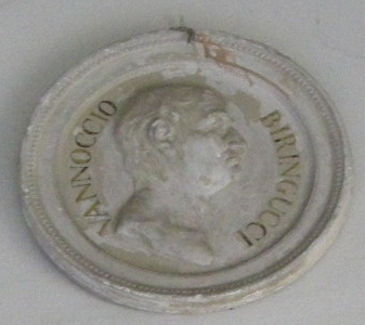 Specola, medaglione di vannoccio biringucci